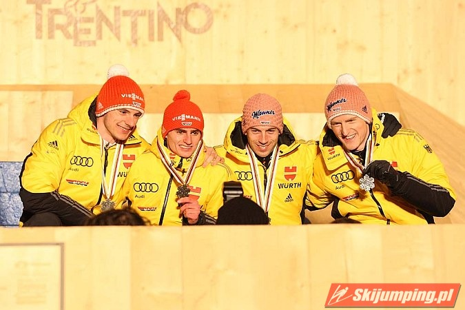 Dekoracja medalowa konkursu drużynowego mężczyzn na skoczni K-120